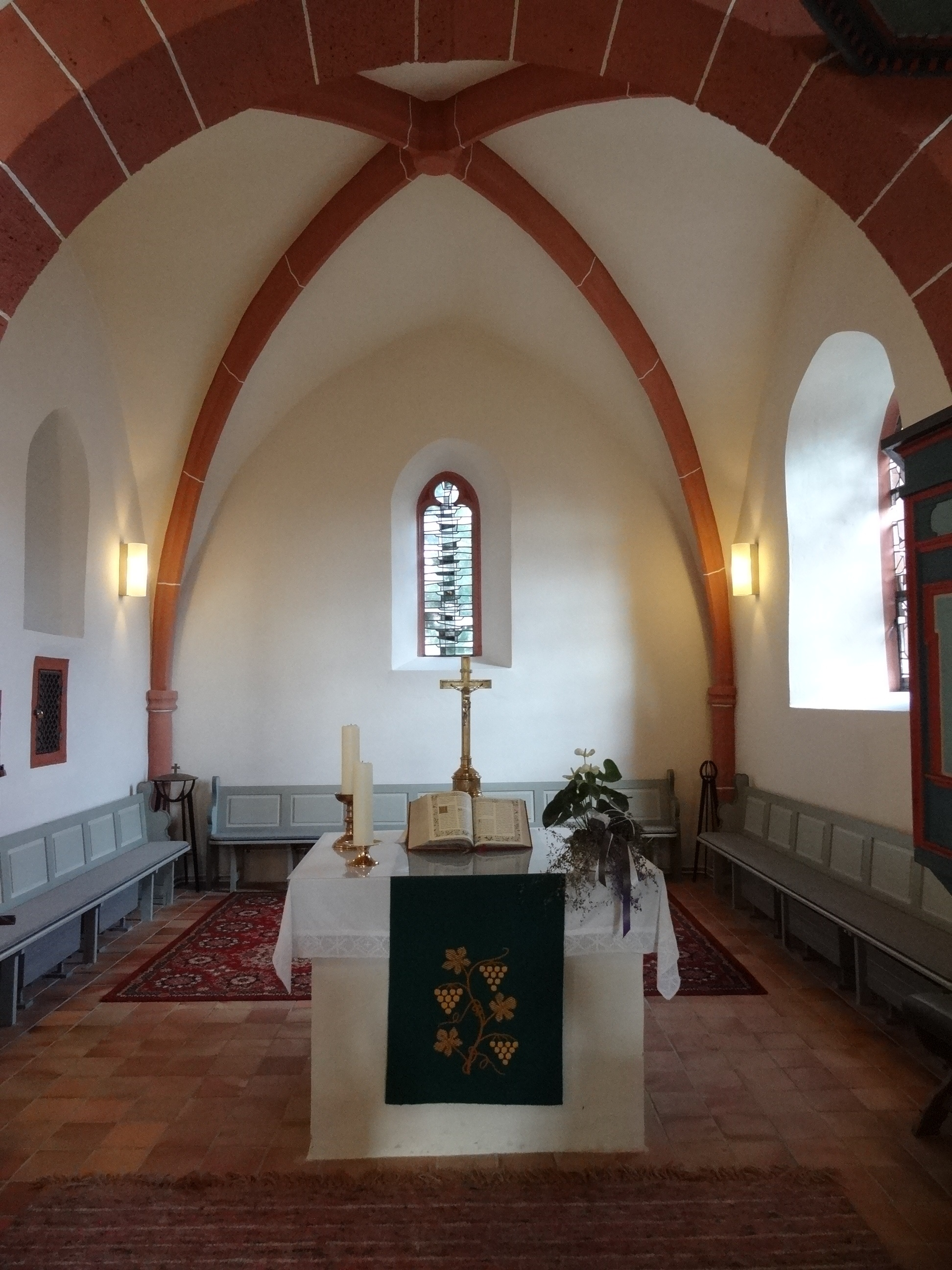 Evangelische Kirche Hausen (Pohlheim)